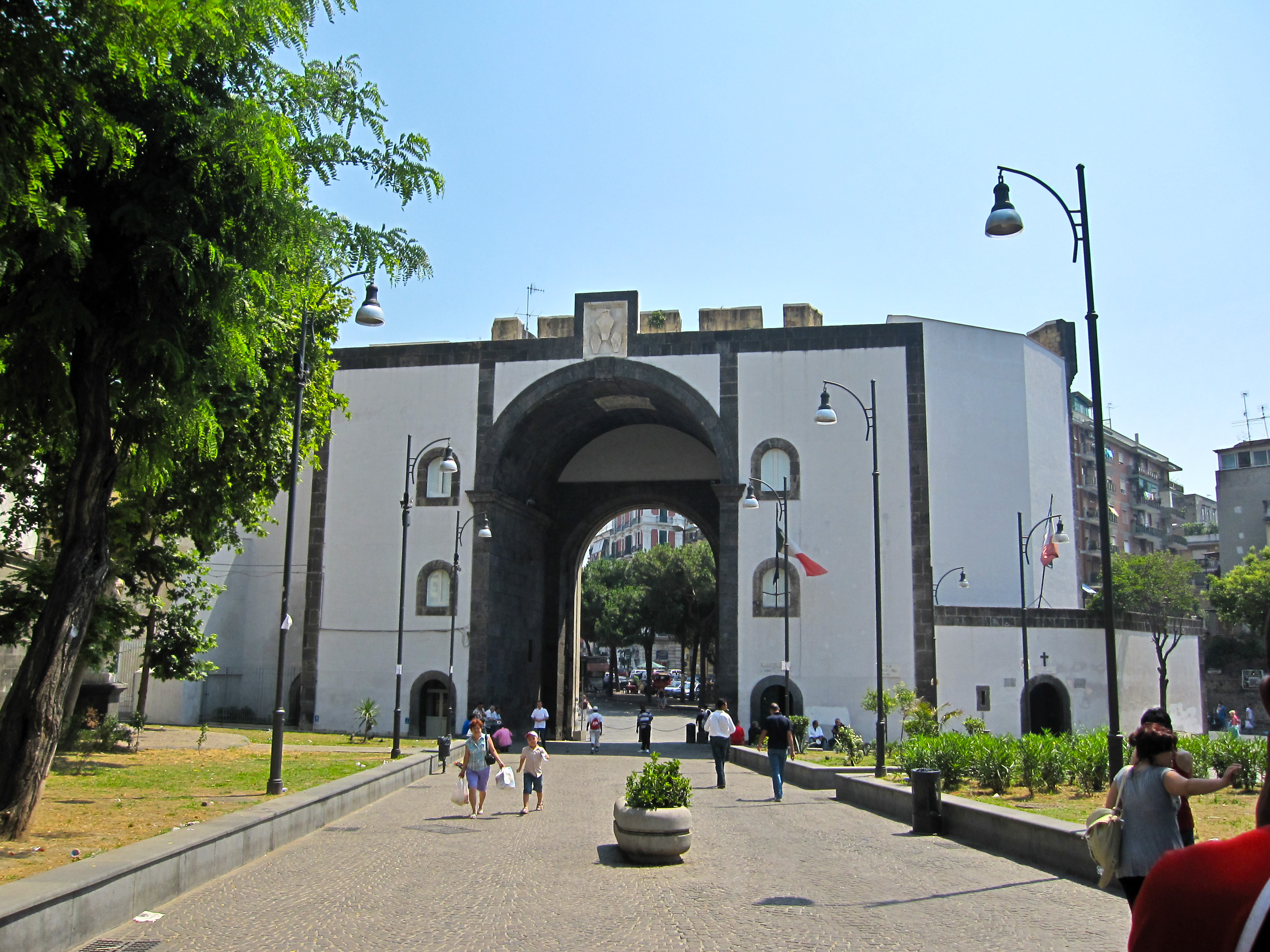 Porta Capuana vista da dietro. Napoli.